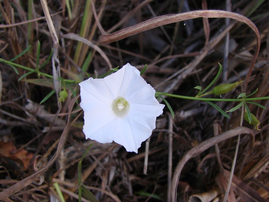 Merremia flagellaris (Choisy) O'Donell - CONVOLVULACEAE Parque Nacional de Brasília - Brasília - Distrito Federal - Brasil.